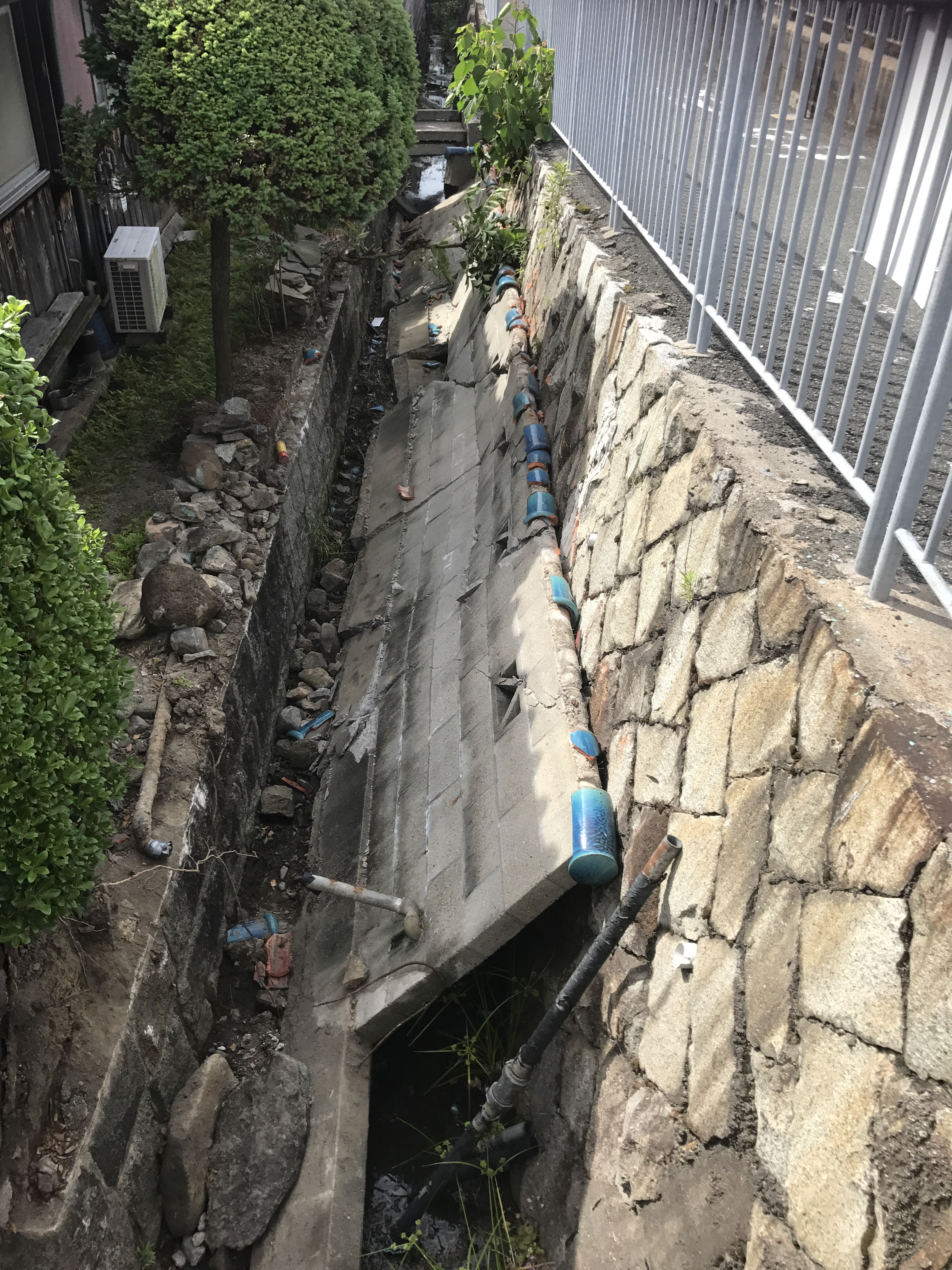 大阪北部地震で倒壊した民家の庭のブロック塀。摂津市正雀にて。